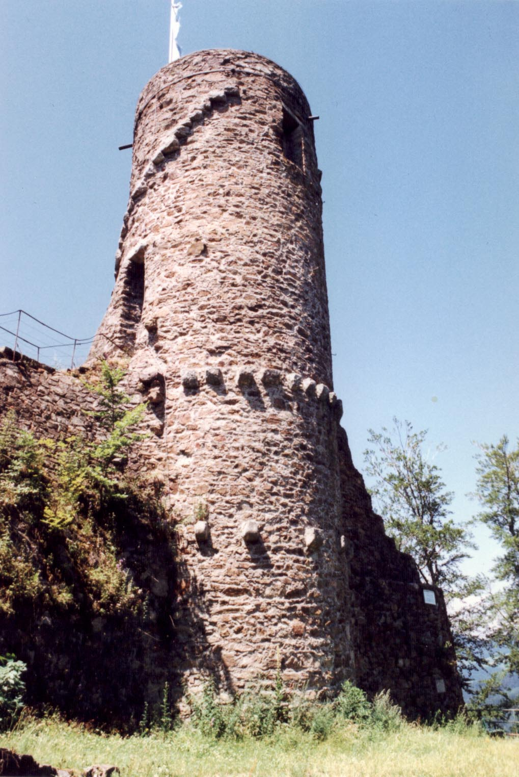 Burg Bärenfels in Wehr (Baden), Bergfried an der Westseite